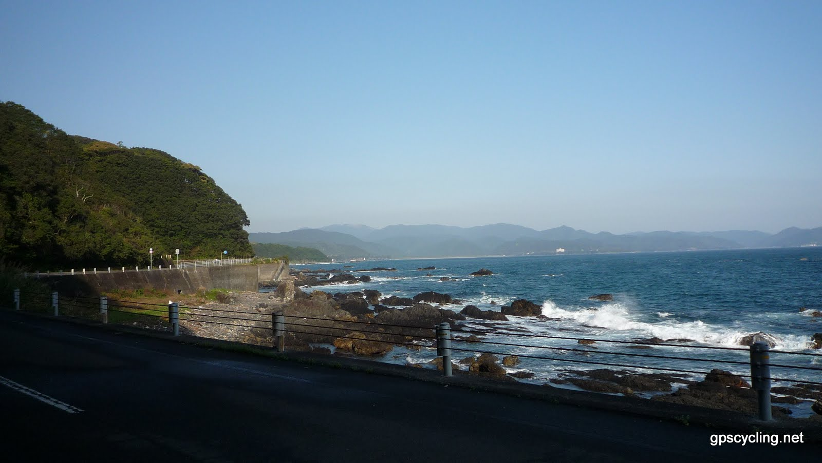 土佐湾